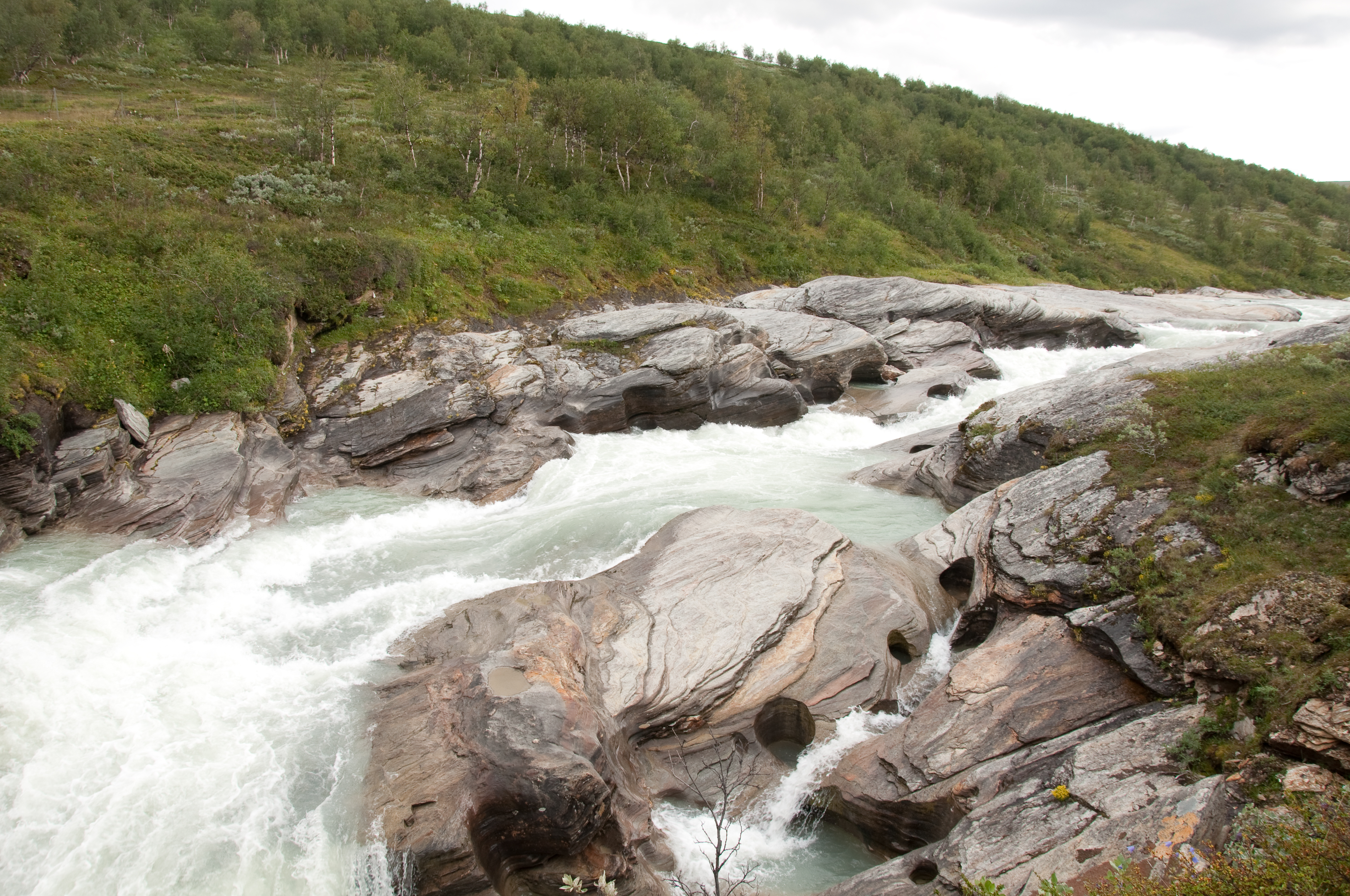 Waterfall in the Låddejåkkå river, Padjelanta national park.